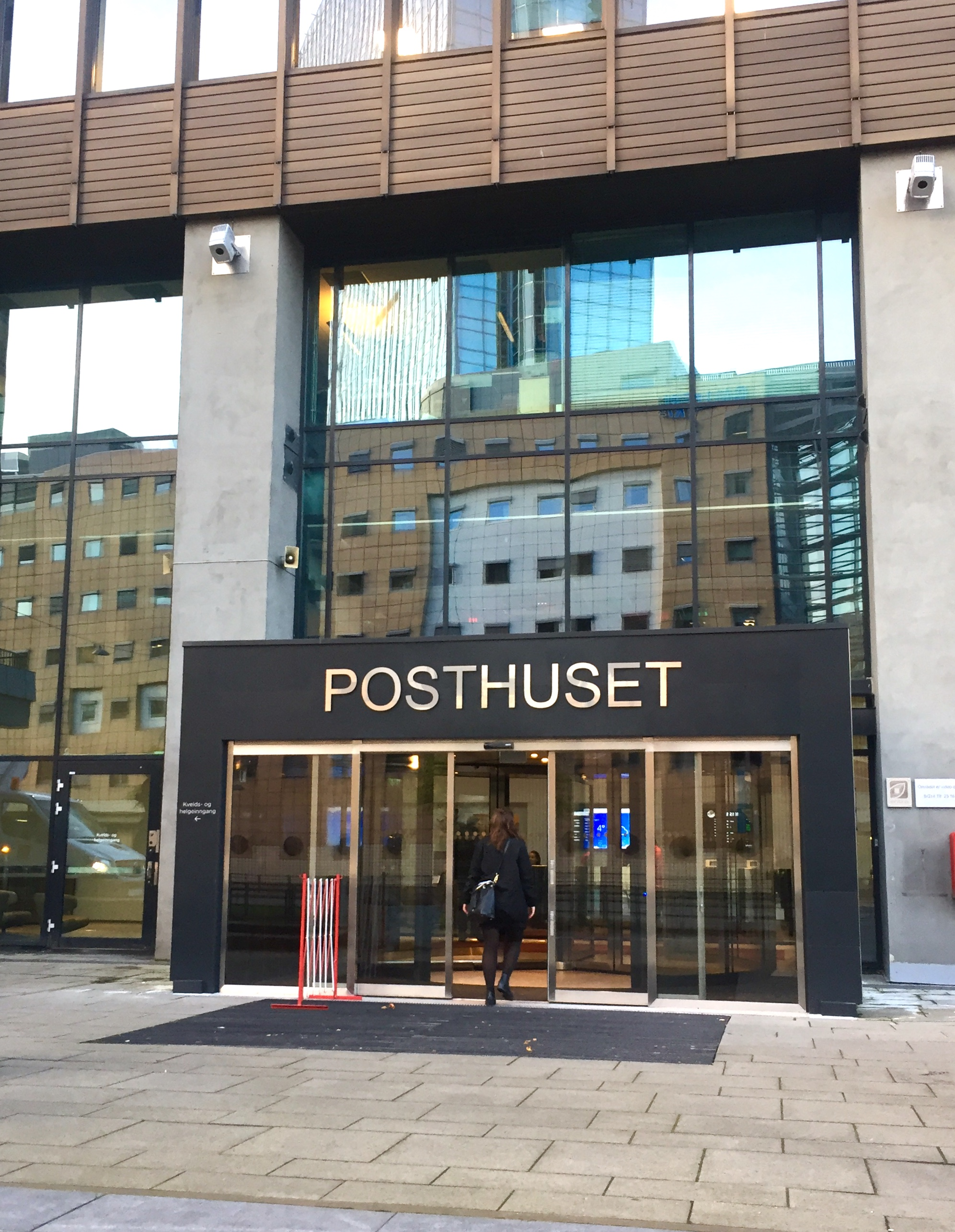 Inngangen til Posthuset i Biskop Gunnerus' gate 14 på Vaterland i Oslo.